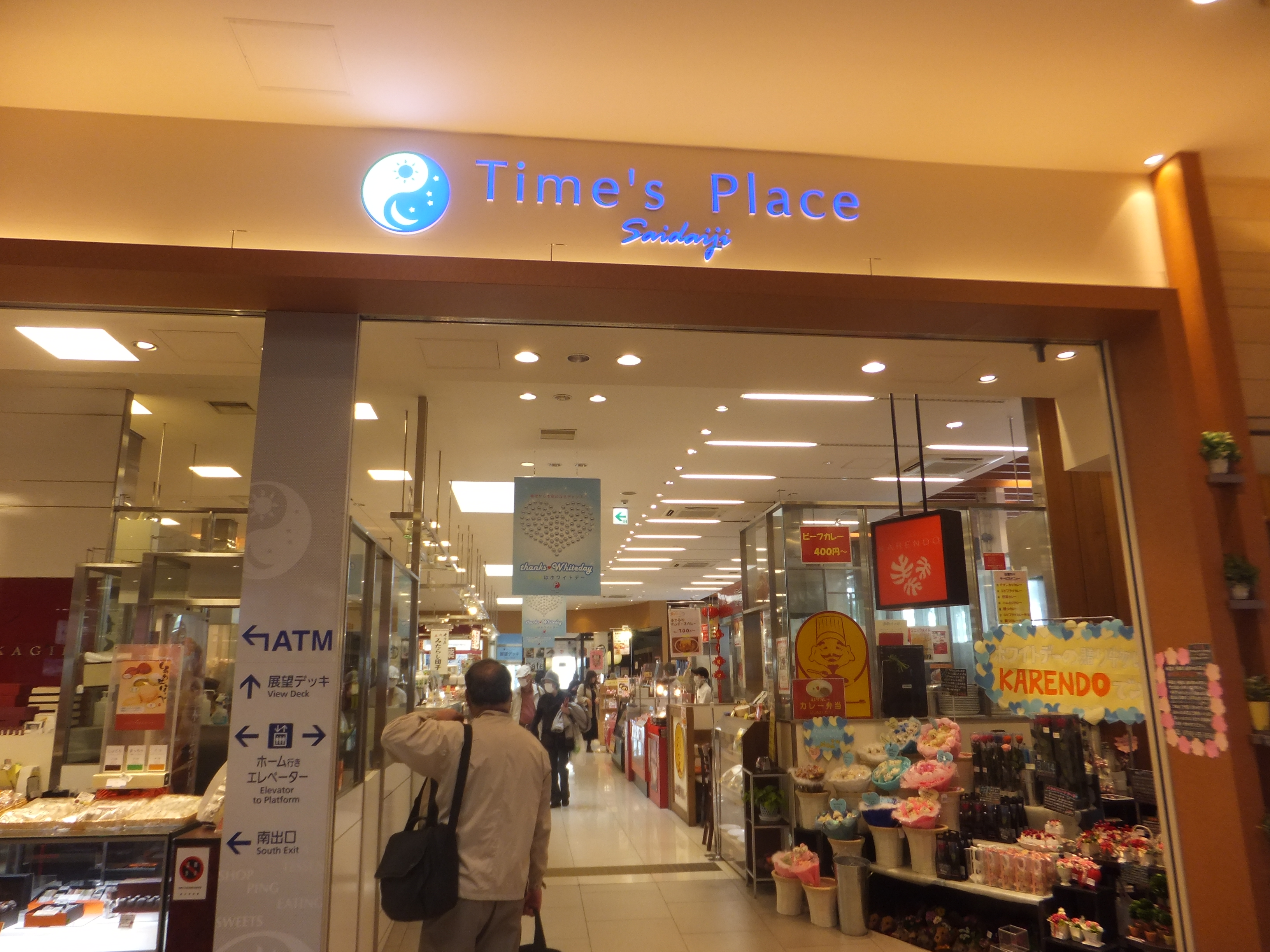 大和西大寺駅 2013年